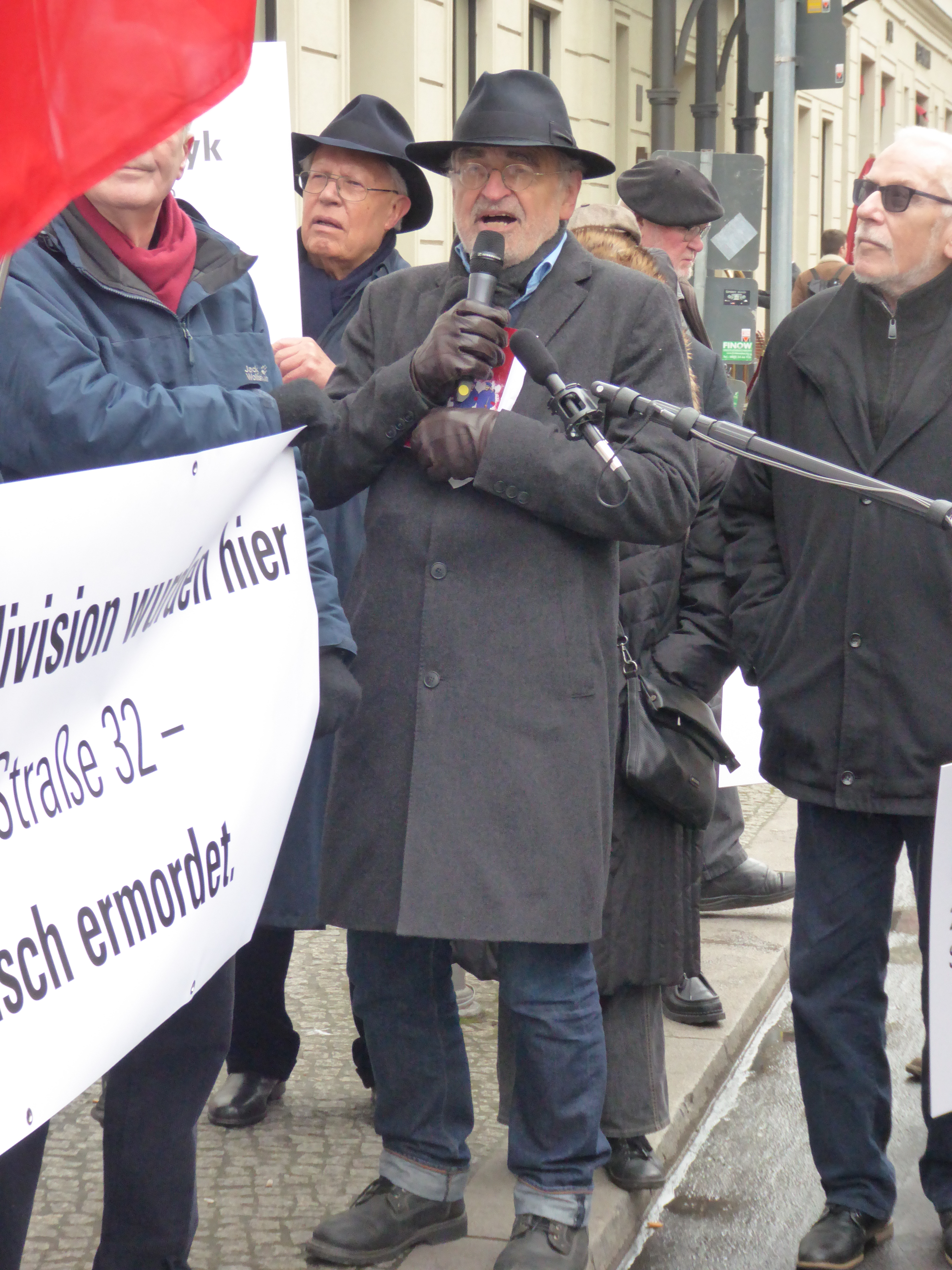 Gedenkveranstaltung Französische Straße 32 am 11. März 2019 anlässlich der Ermordung von 30 Angehörigen der Volksmarinedivision vor 100 Jahren im Hof des Hauses. Organisator der Veranstaltung Klaus Gietinger. Heute Sitz der Robert-Bosch-Stiftung.